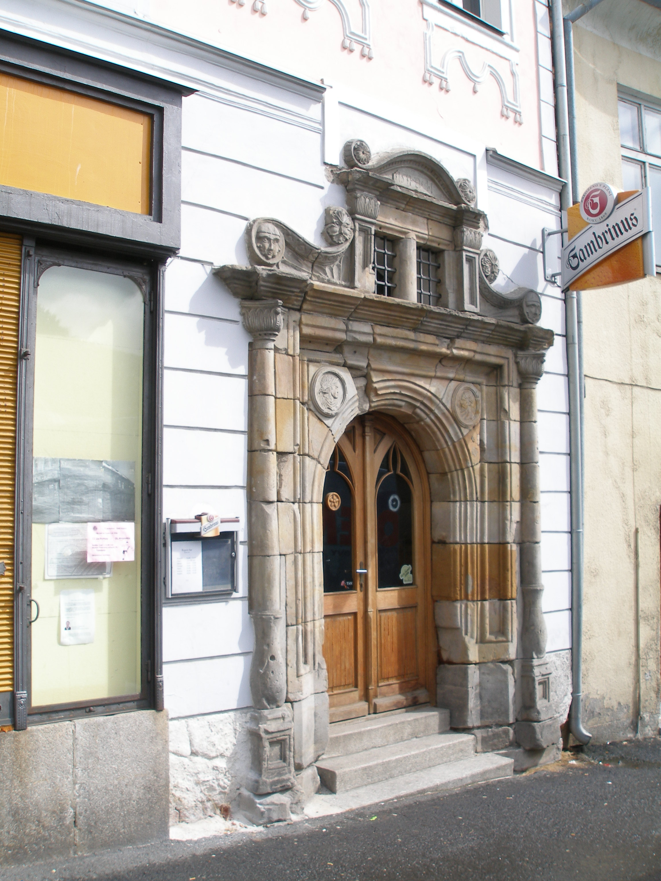 Jáchymov - renesanční portál domu č. 145 na východní straně náměstí